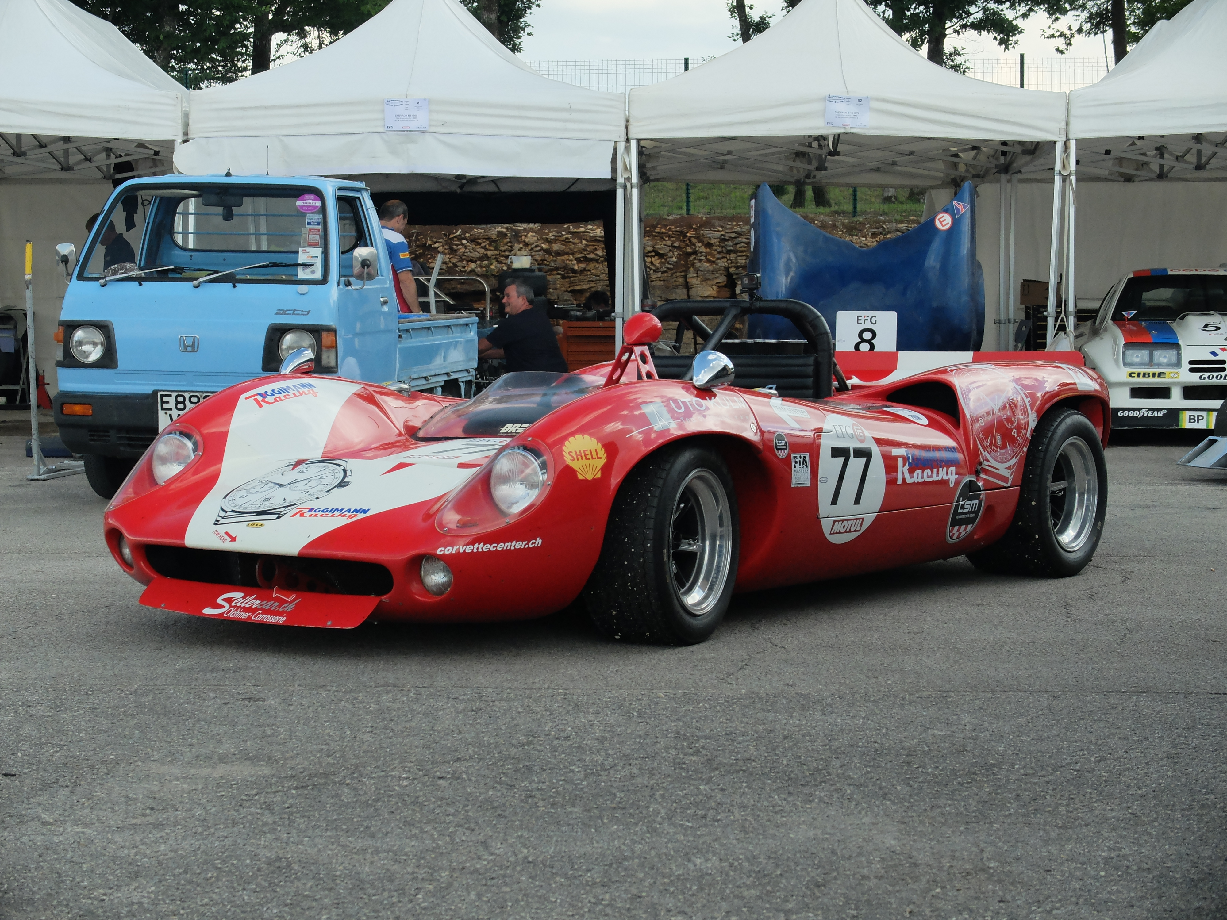 2018 Grand Prix de l’Âge d’Or - Dijon-Prenois - Lola T70 MkII Spyder 1966